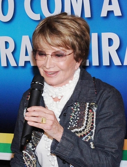 Atriz Glória Menezes durante encontro com artistas em apoio à candidatura de José Serra à presidência. SP, 21/09/2010